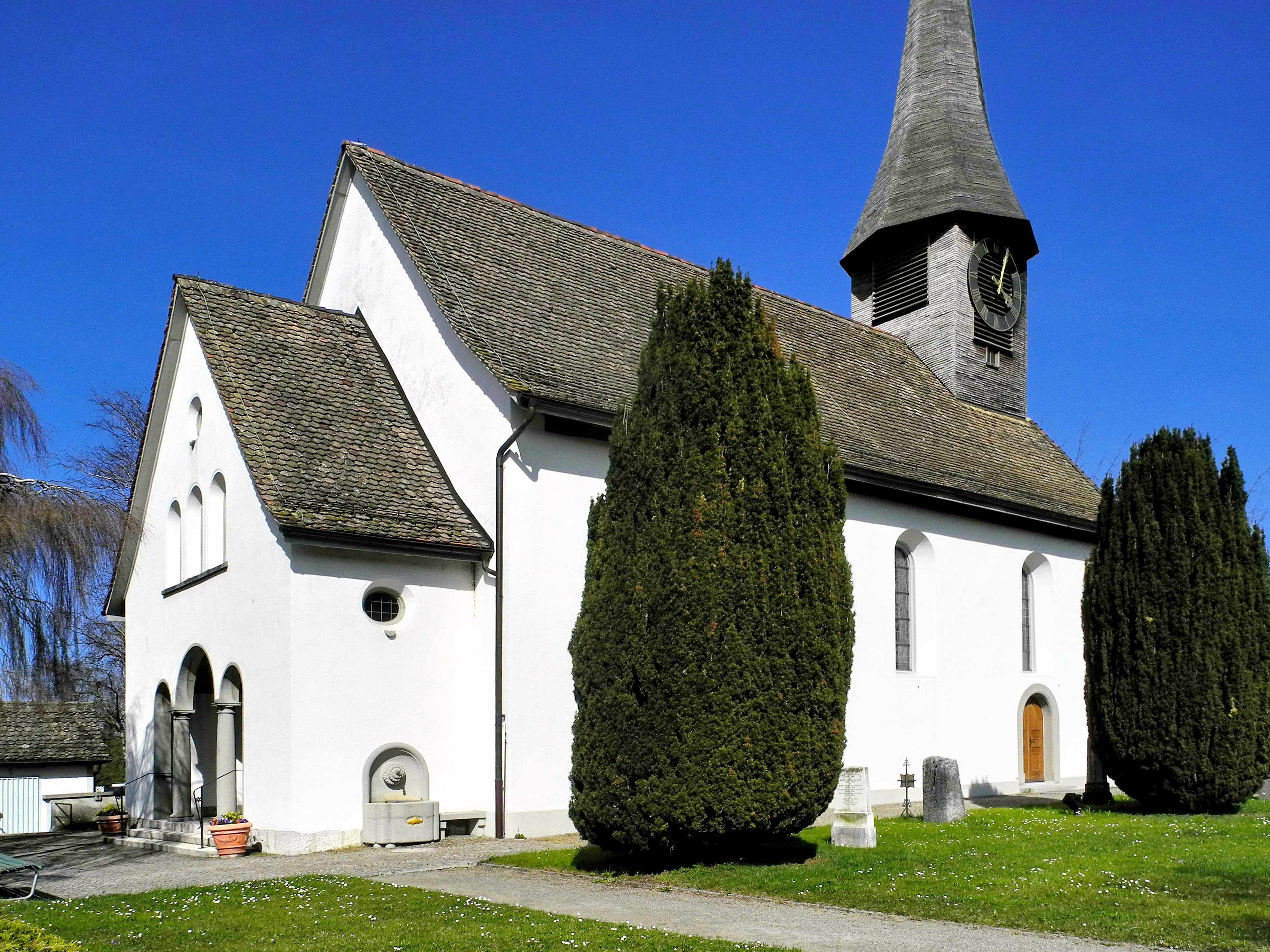 Reformierte Kirche in Zürich-Unteraffoltern (Switzerland)